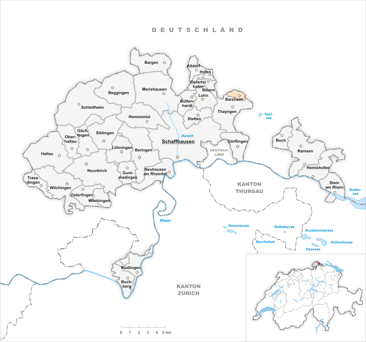 Municipality Barzheim Artist: Tschubby